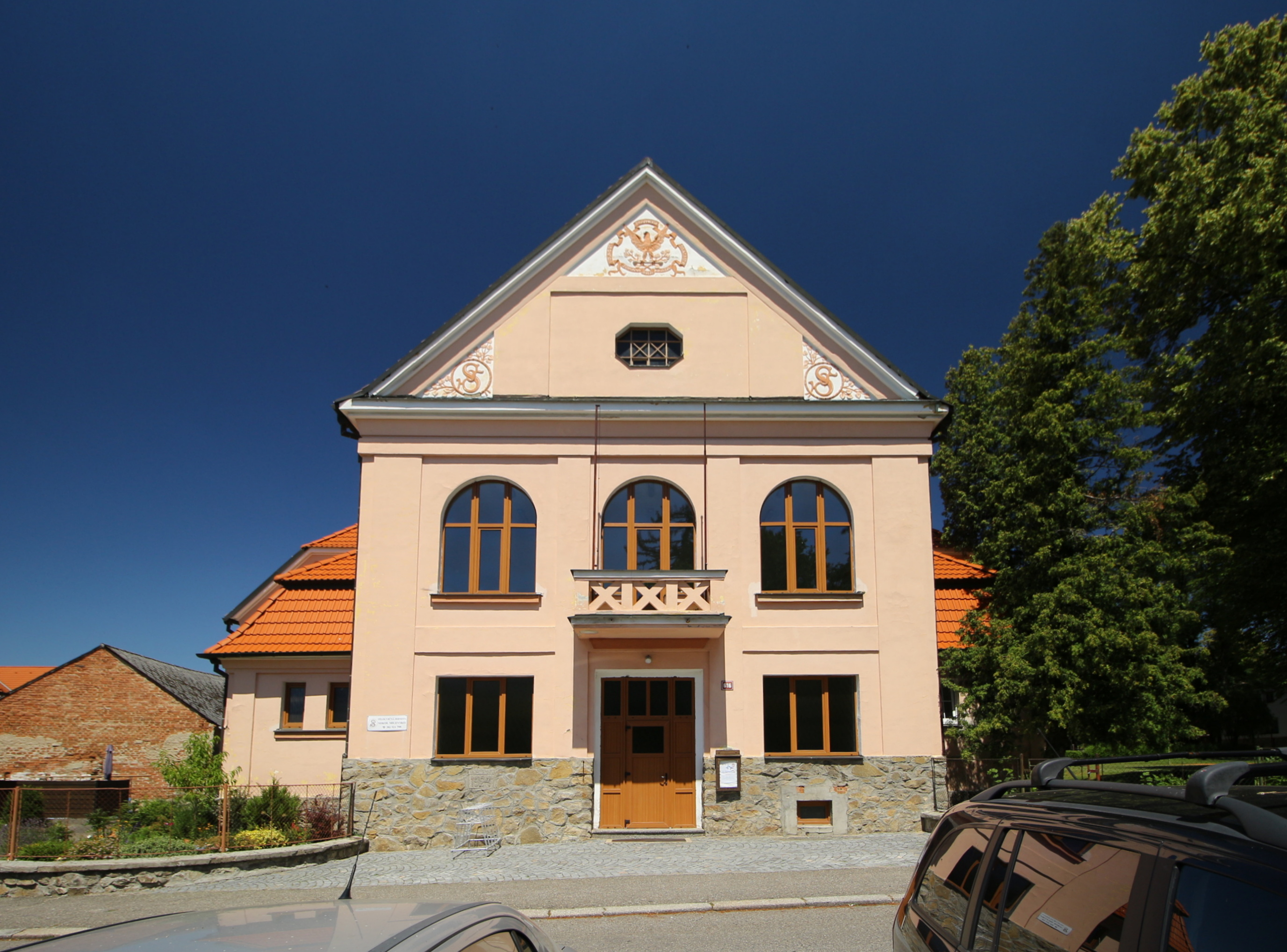 Tyršovo náměstí a sokolovna v Milevsku